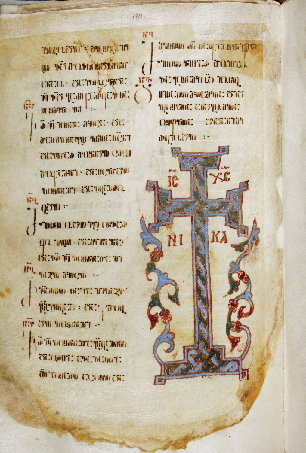 ოთხთავი (S-962)